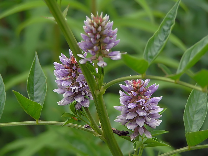 عرقسوس شاحب الأزهار